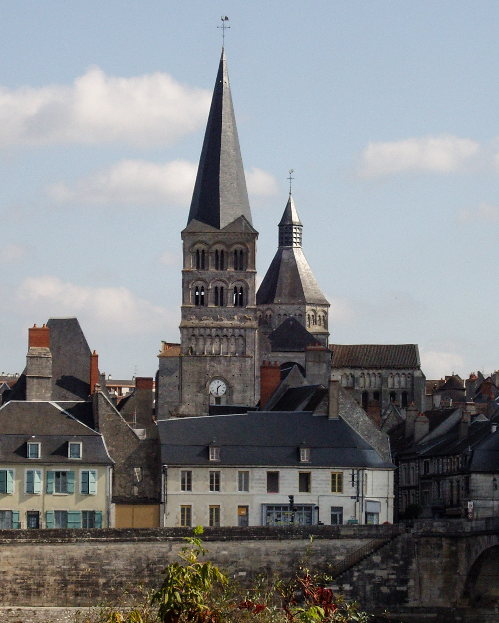 Ansicht über die Loire Hinweg auf Notre Dame de La Charité